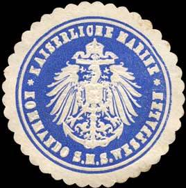 Sealing stamp Title: Kaiserliche Marine - Kommando der S.M.S. Westfalen Description: blau, weiß, geprägt Place: size: 4 cm